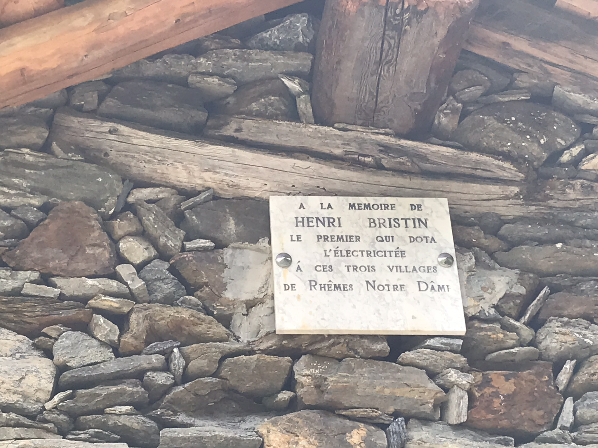 Plaque centrale hydroélectrique - lac Pellaud - Rhêmes ND (Vallée d'Aoste)